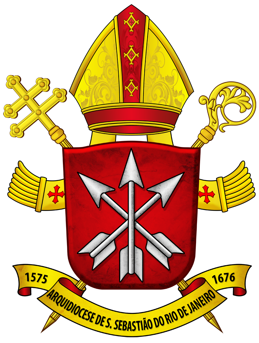 Decreto de Sua Eminência Reverendíssima, Orani João Cardeal Tempesta: "Aos que este Nosso Decreto virem, Saudação, Paz e Bênção no Senhor! Fazemos saber que constituímos o novo Brasão desta Arquidiocese de São Sebastião do Rio de Janeiro, com a seguinte descrição heráldica: O escudo em campo de goles, arredondado na ponta e ao centro do chefe, com três setas de prata; sendo que a do centro, dirigida para o chefe, é colocada sobre as outras duas que são cruzadas em diagonal e dirigidas, respectivamente, para cantão destro de frente e cantão sinistro de frente. O escudo é apoiado pela cruz arquiepiscopal de lorena à destra e pelo báculo à sinistra, postos em aspas, tudo em ouro. Timbra o conjunto uma mitra nobre de ouro com pala de vermelho, e um listel de ouro forrado de vermelho com o nome da arquidiocese em capitais de negro e os anos da criação da prelazia, 19 de julho de 1575, e da elevação à diocese, 16 de novembro de 1676. Dado e passado em Nossa Cúria Metropolitana, aos 13 dias do mês de maio de 2015, sob Nosso Sinal e Selo de Nossa Chancelaria. Orani João Cardeal Tempesta, O.Cist. Arcebispo Metropolitano de São Sebastião do Rio de Janeiro Mons. Helio Pacheco Filho Chanceler da Cúria"